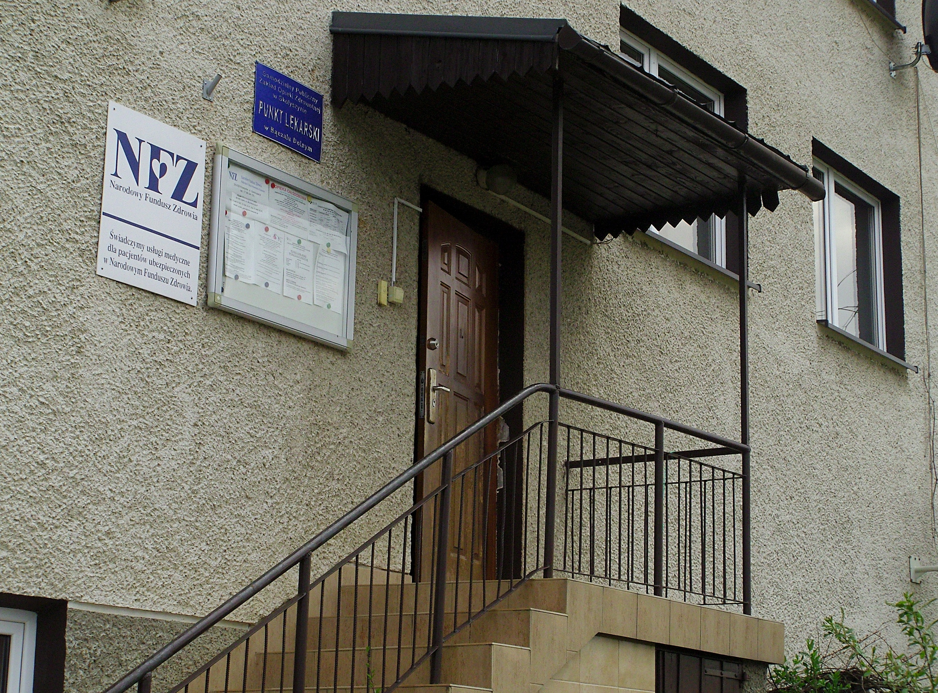 Punkt lekarski w Bączalu Dolnym mieszczący się w budynku Zespołu Szkół Publicznych.